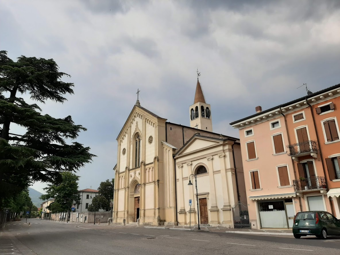 Facciate della chiesa di S. Giorgio Martire e dell'oratorio di S. Luigi Gonzaga - Comune di Cazzano di Tramigna (VR).